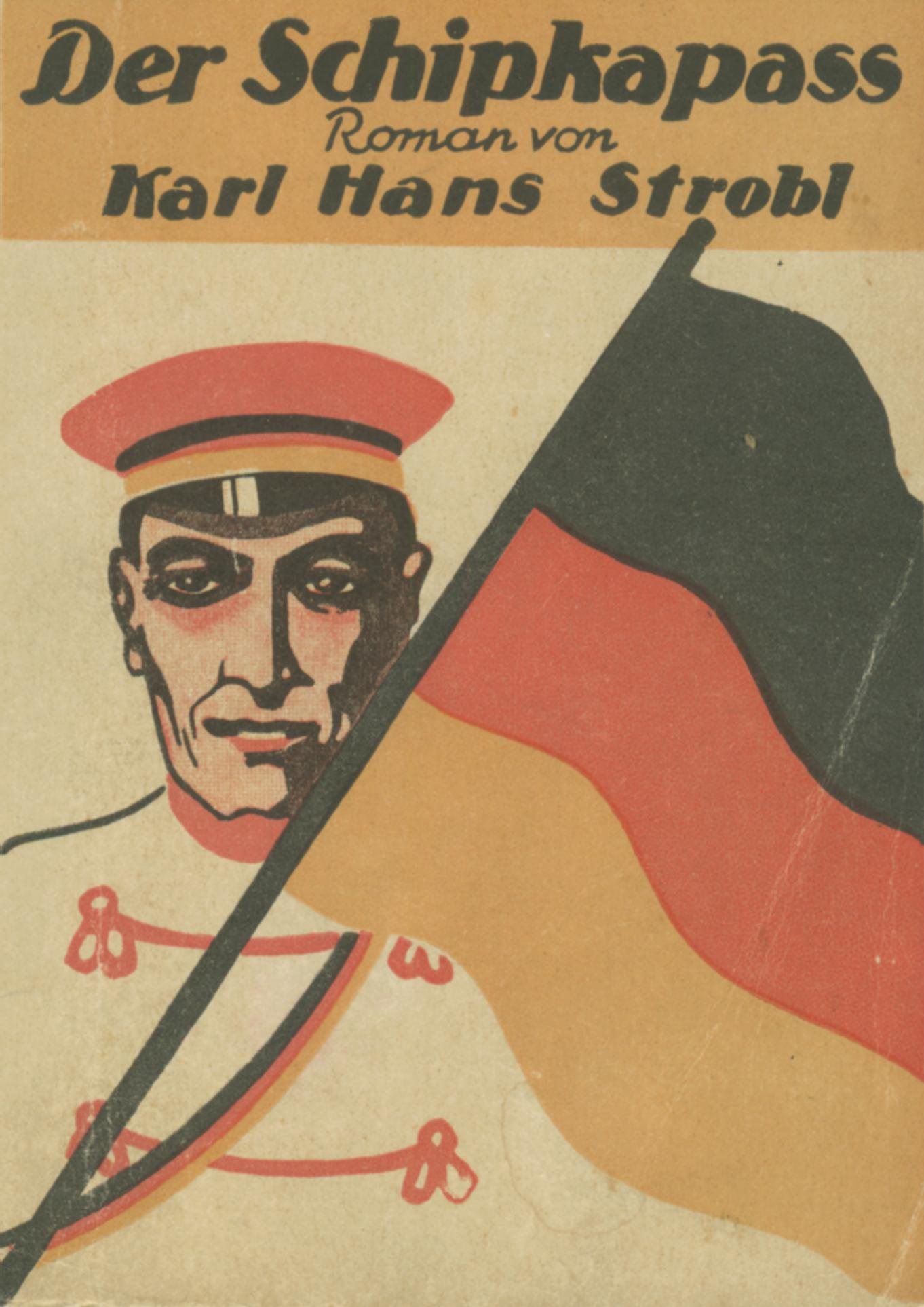 Titelblatt des Romans Der Schipkapass von Karl Hans Strobl, undatierte Ausgabe des Kronen-Verlags